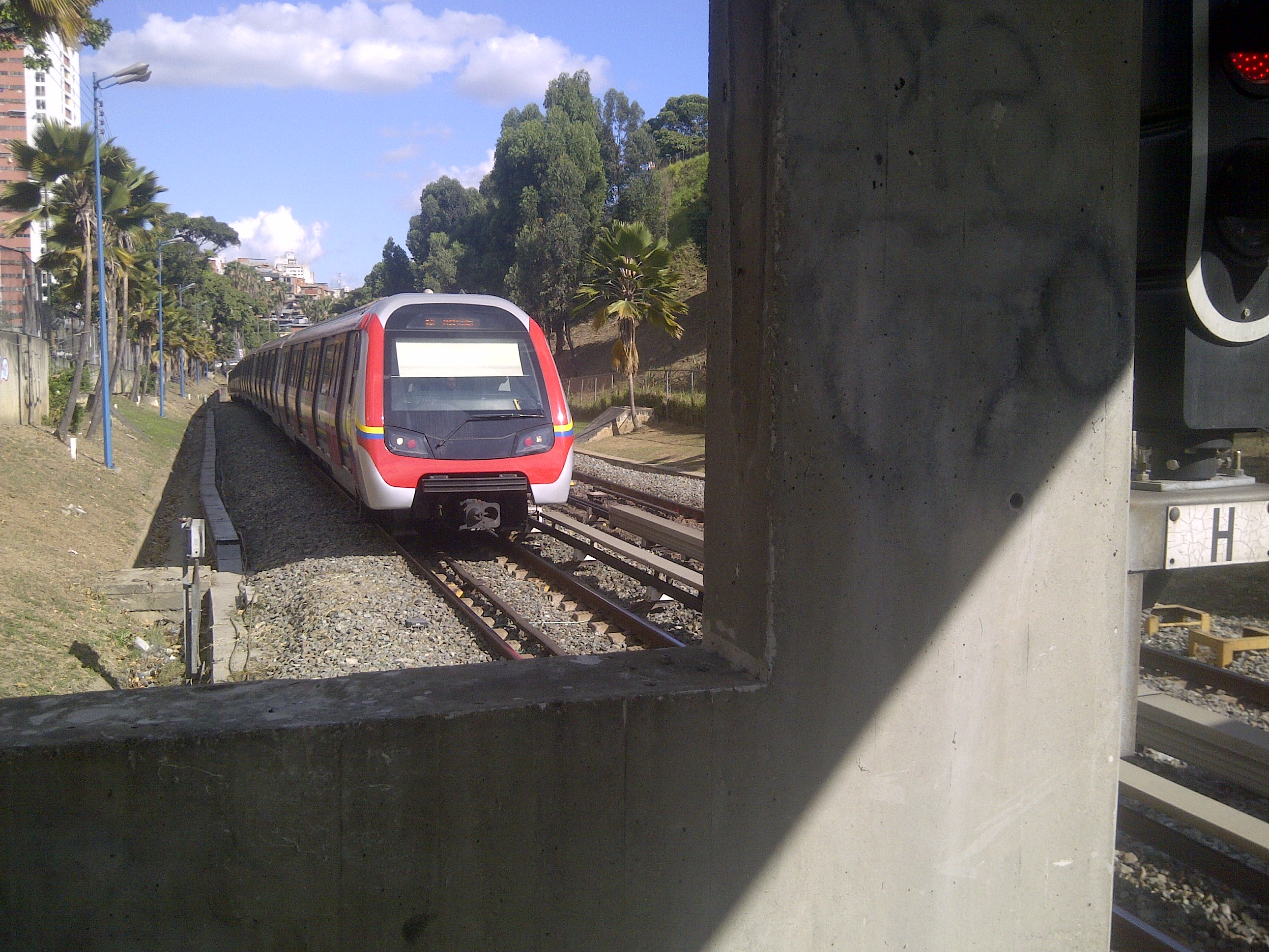 Tren S6, Caracas